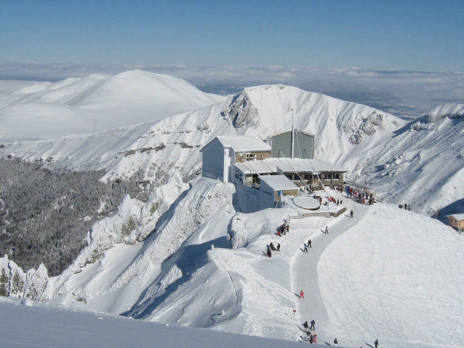 Arrivée du haut téléphérique du Mont-Dore.